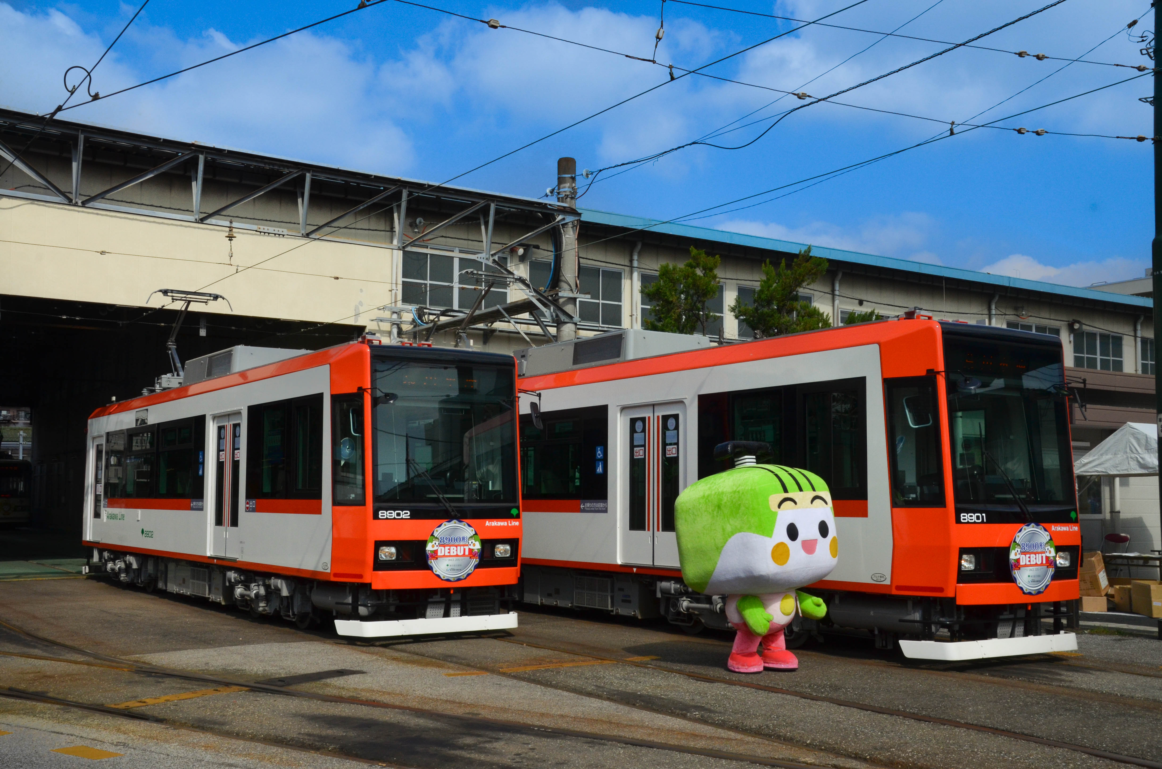 都電荒川線8901号車、8902号車とマスコットキャラクター「とあらん」